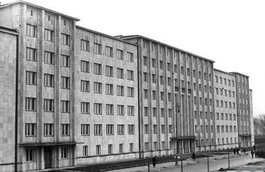 Budynek Dyrekcji Lasów Państwowych ul. Wawelska 52/54 w Warszawie Modernistyczny gmach zbudowany w roku 1936. Posiada on trzy fasady od strony ulic Reja, Krzyckiego i Wawelskiej. Był budowany w dwóch etapach: w roku 1928 – według projektu architekta Stefana Tomorowicza i w latach 1934-1936 – według projektu architekta Jana Zabłockiego.